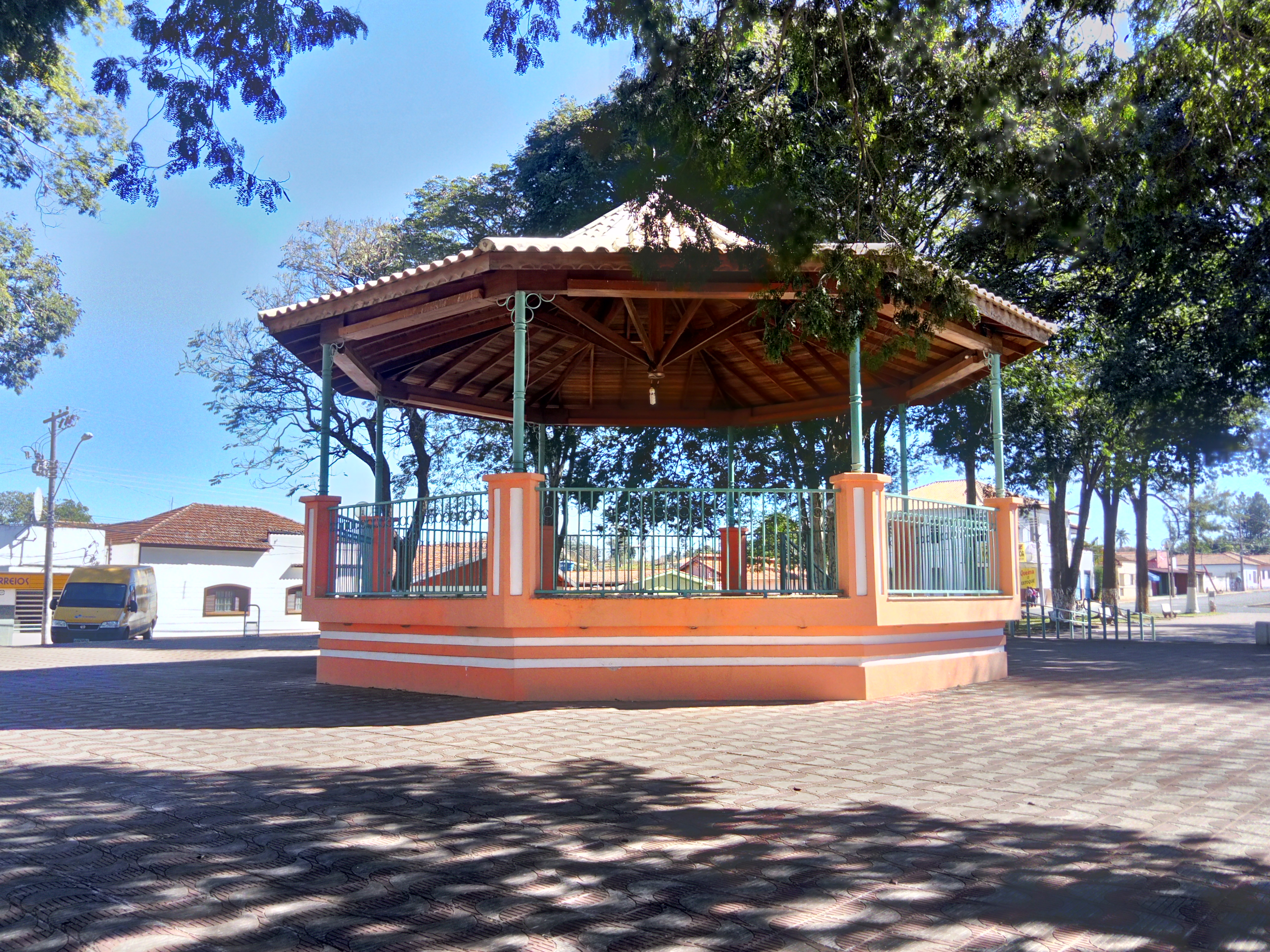 Coreto central na praça Getúlio Vargas em Divisa Nova, MG.